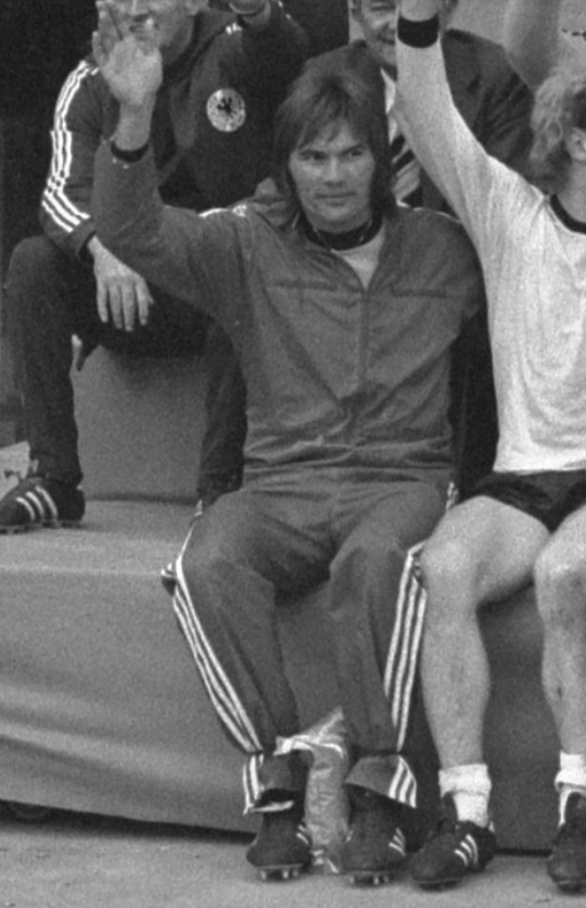 Norbert Nigbur celebrando la obtención de la Copa Mundial de 1974